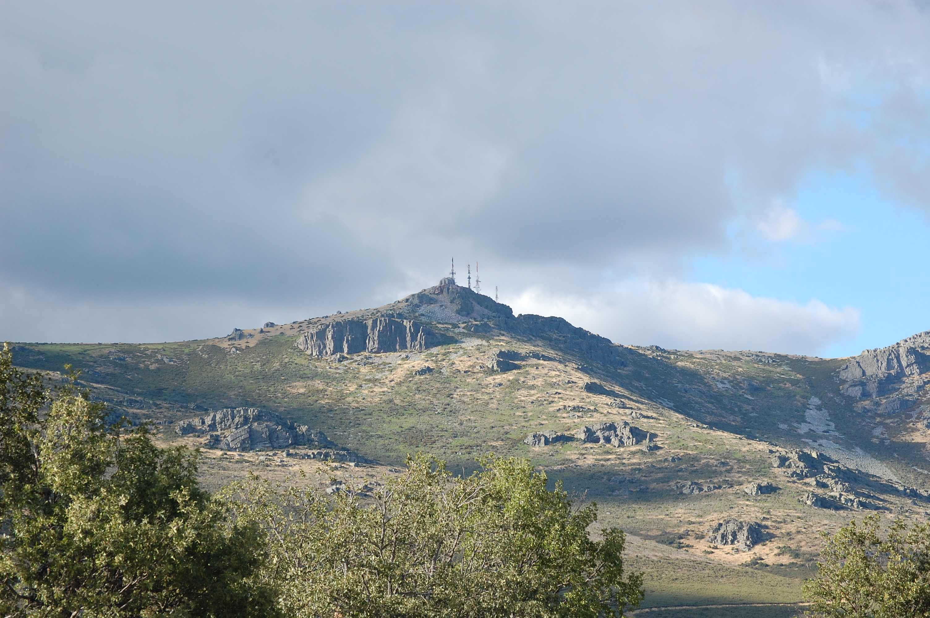 Vista del Alto Rey y de la ermita. Guadalajra, Castilla, La Mancha, España.